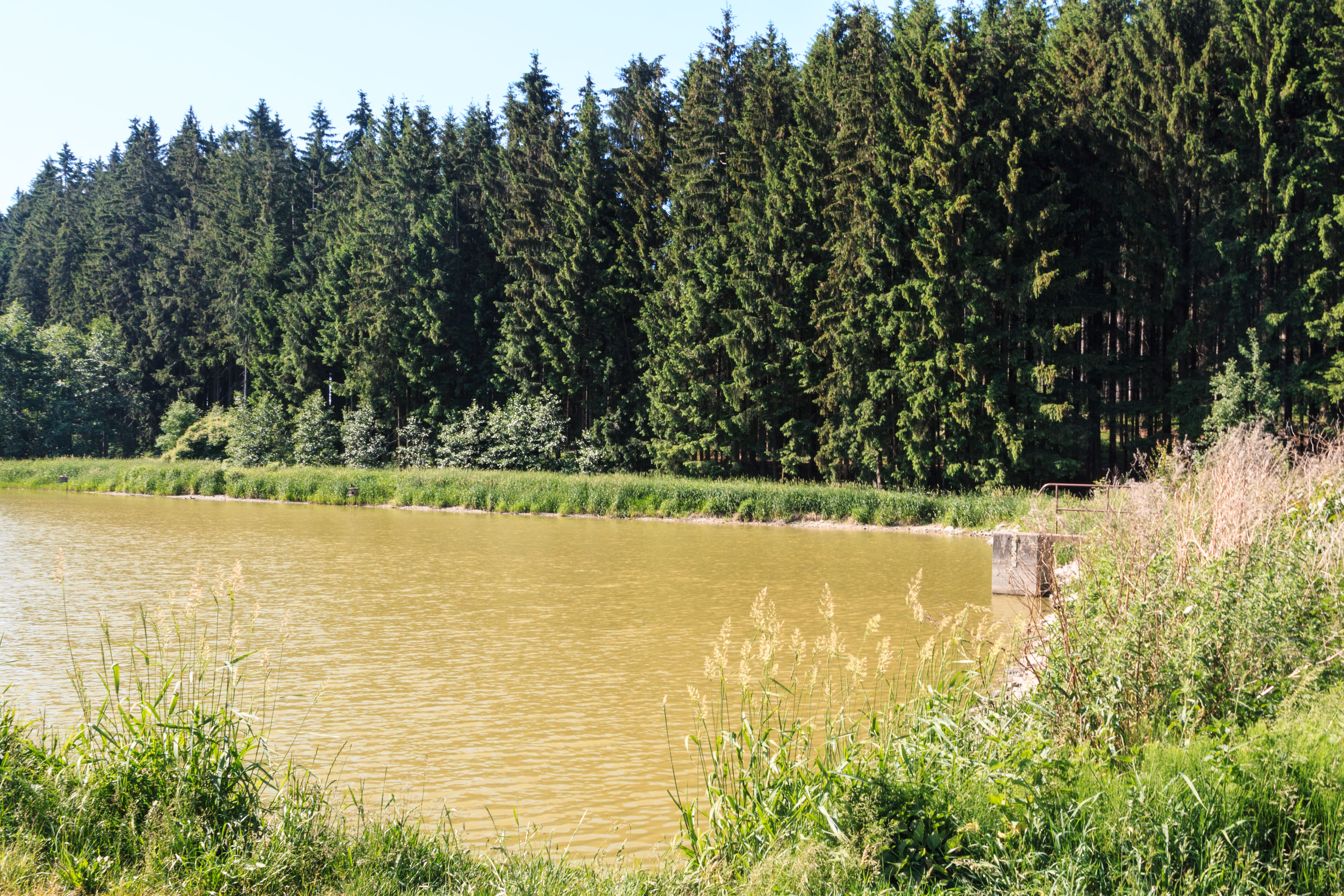 Jakelský rybník u Poličky Project: Vodstvo.